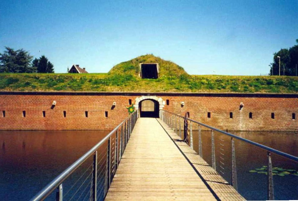 Der Eingangsbereich des Jülicher Brückenkopfes